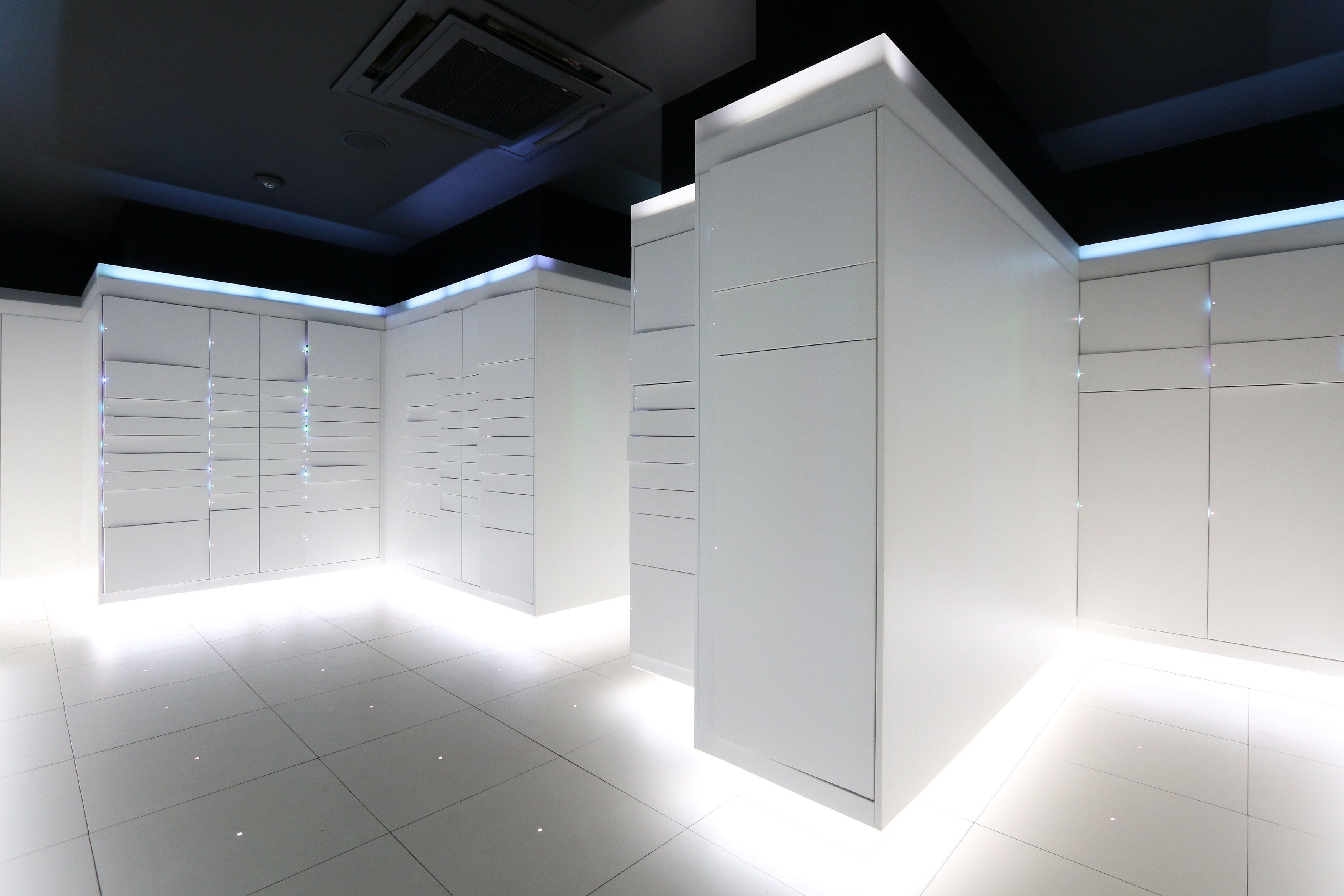 Interiér Prodejny budoucnosti v Praze u metra Flora, Jičínská 2348/10, Praha-Vinohrady, pořízeno před tiskovou konferencí u příležitosti otevření